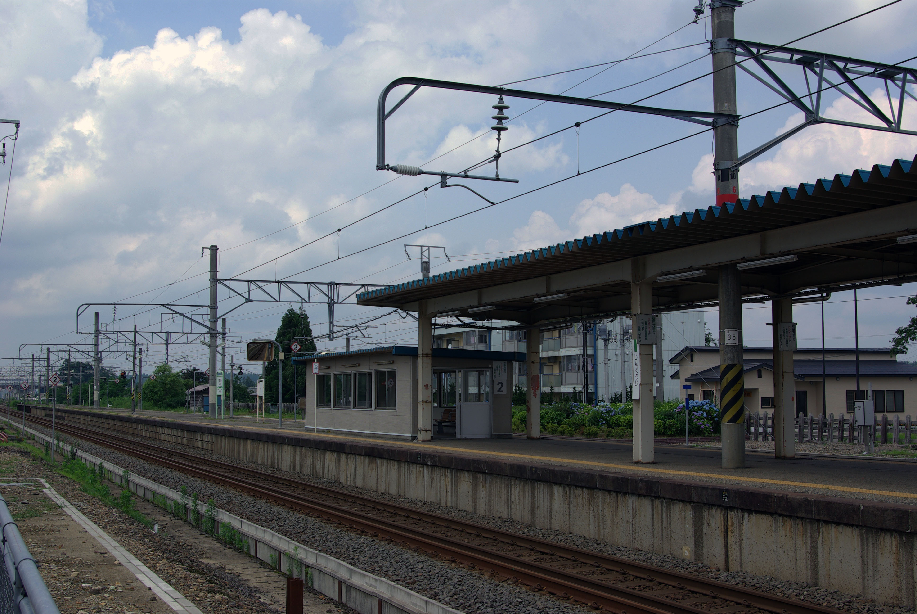 奥羽本線神宮寺駅